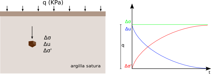 Carico applicato su un elemento di volume di terreno con relativo grafico delle tensioni che si sviluppano nel tempo.